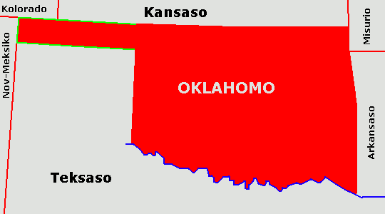 "Patotenilo" de Oklahomo